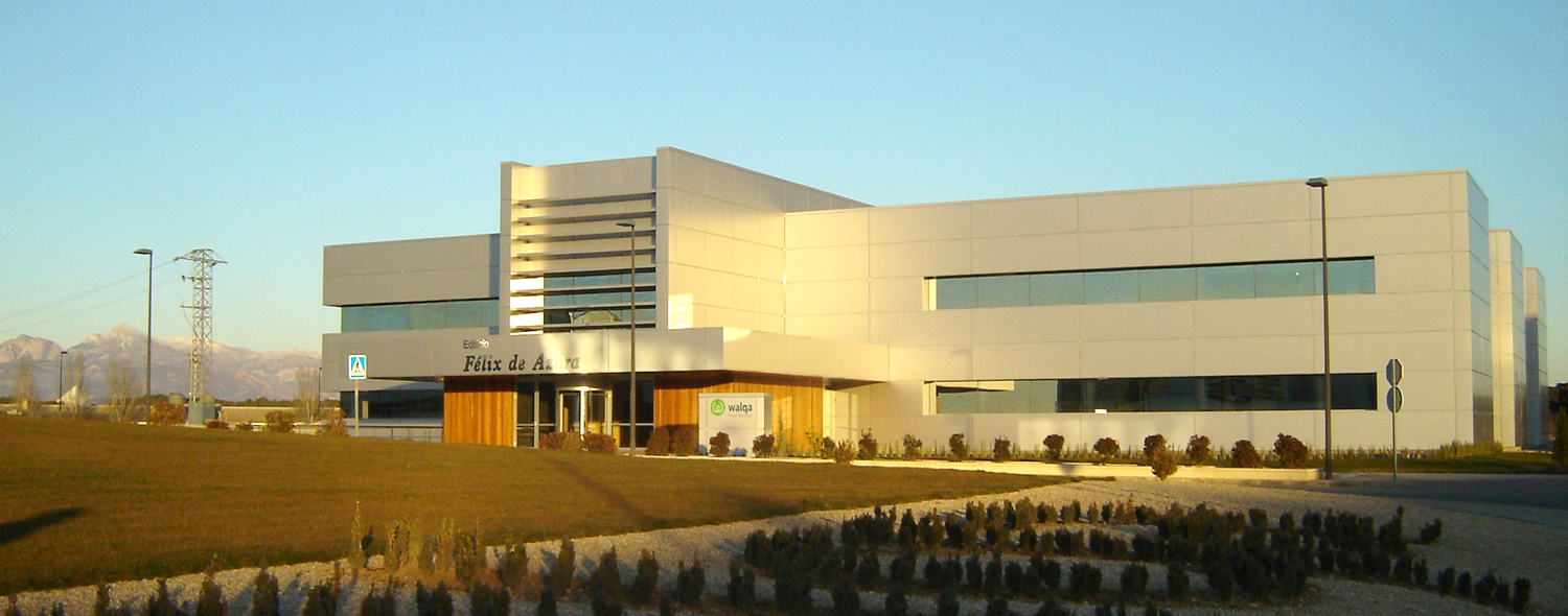 Campus de Huesca